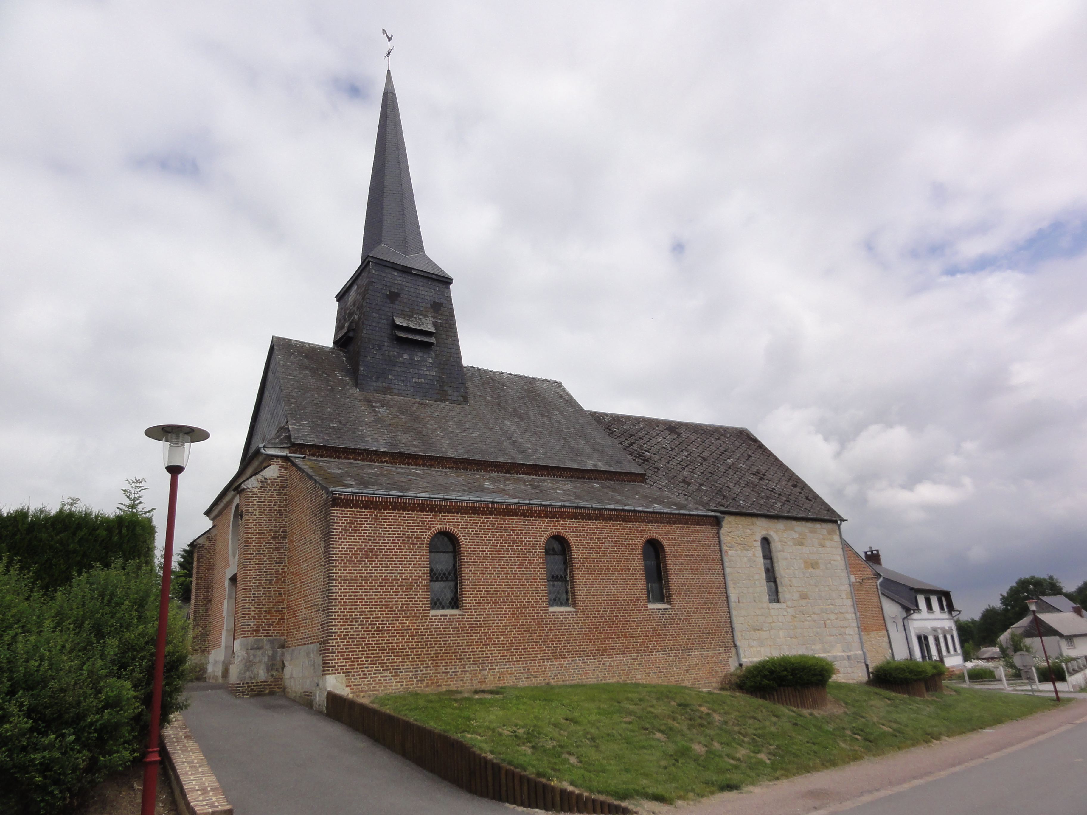 Beaumé (Aisne) église (